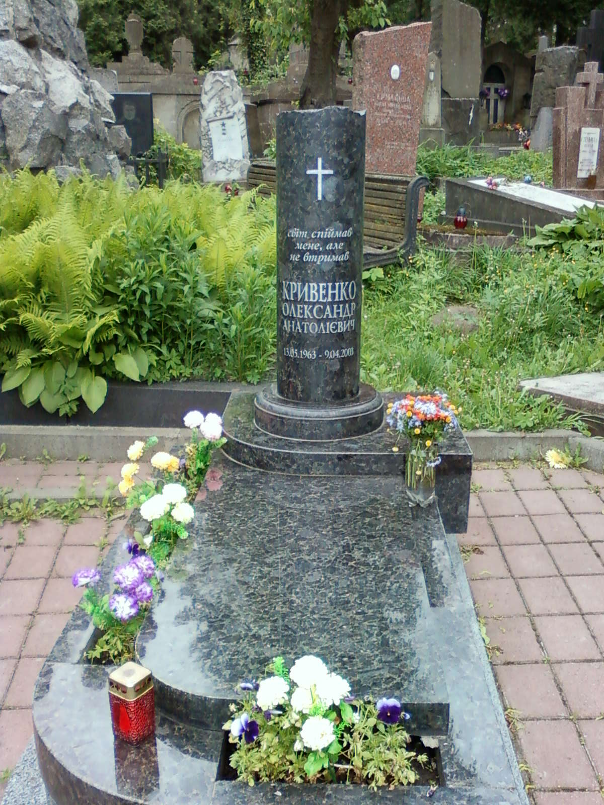 Надгробный памятник украинского журналиста и общественного деятеля Кривенко Александра Анатольевича (1963-2003) на Лычаковском кладбище (Львов)